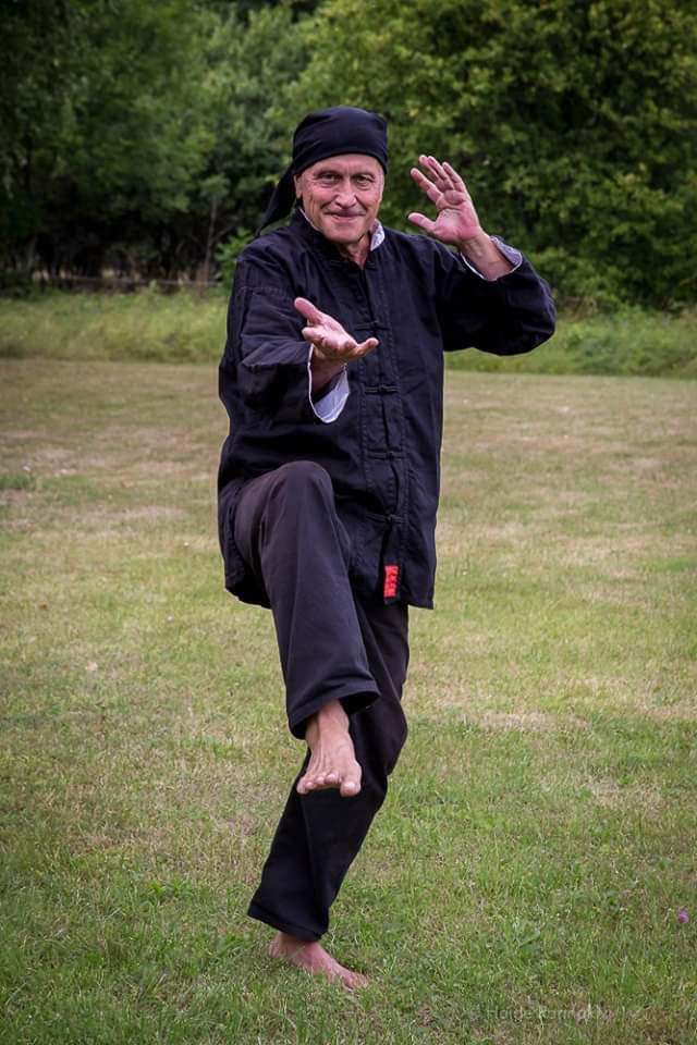 Toomas Ots 2018. aasta juulis Tõstamaa lähistel Rein Siimu Taiji Kooli Taiji laagris.